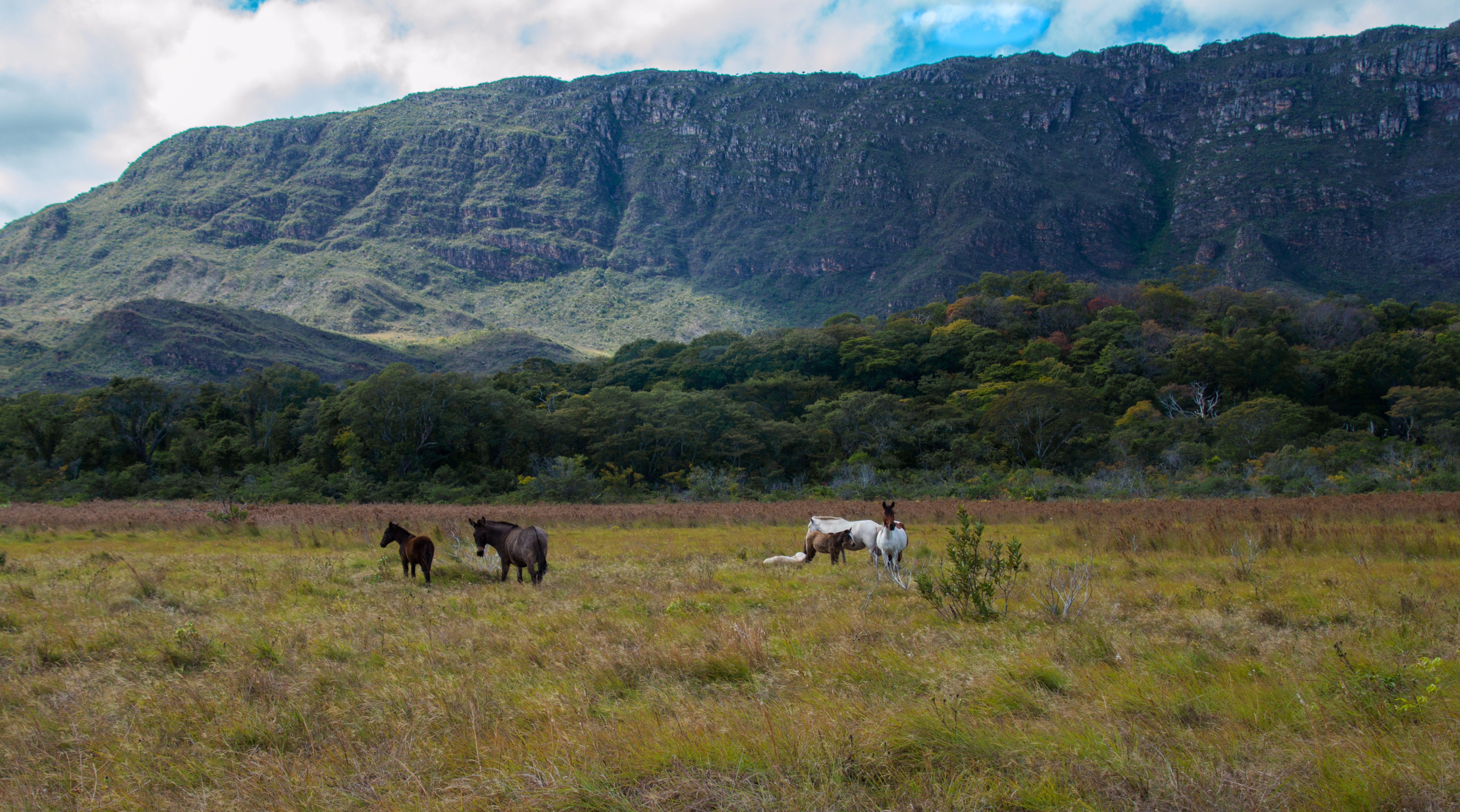 O Cerrado é o segundo maior bioma da América do Sul, ocupando uma área de 2.036.448 km2, cerca de 22% do território nacional. A região é habitat para mais de 12 mil espécies vegetais, e, segundo dados da Embrapa, podem ser encontradas cerca de 400 espécies de plantas por hectare. Estima-se que mais de 320 mil espécies de animais habitem esse bioma, sendo dessas, 90.000 espécies de insetos.